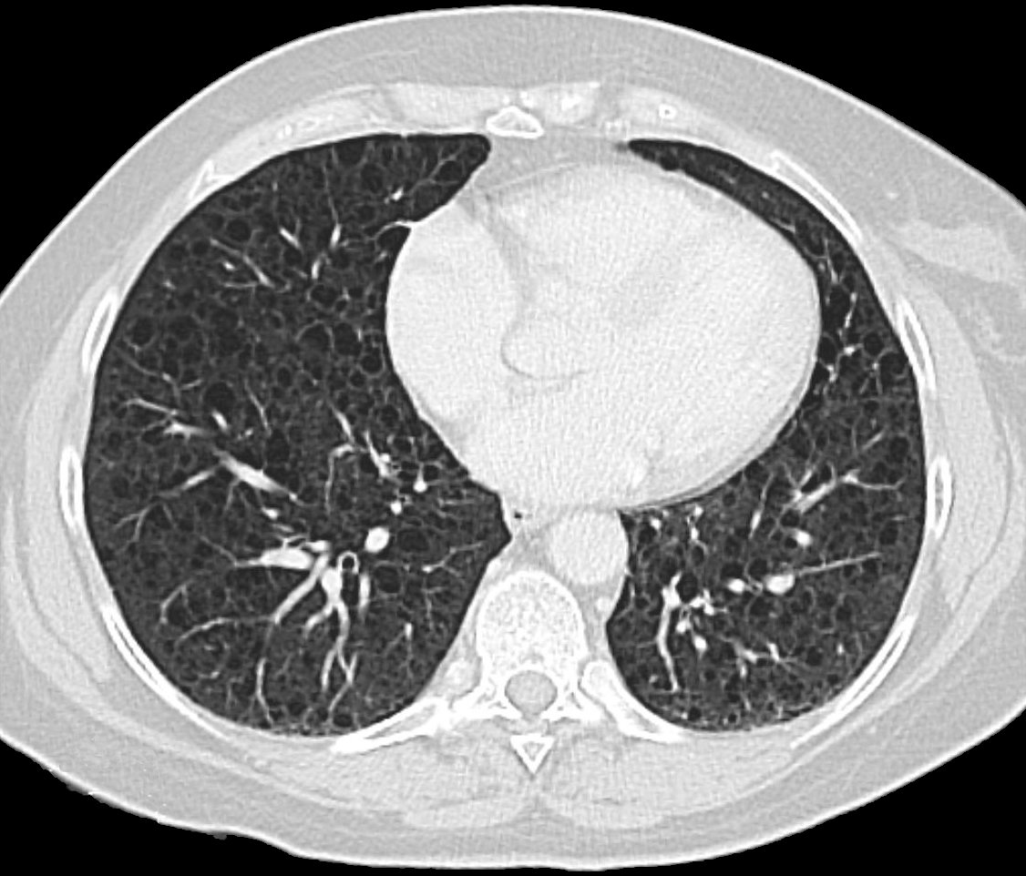 Computertomographie: Bild einer Lymphangioleiomyomatose bei Patientin mit multiplen Angiomyolipomen der Nieren: Dringender Verdacht auf Tuberöse Sklerose.